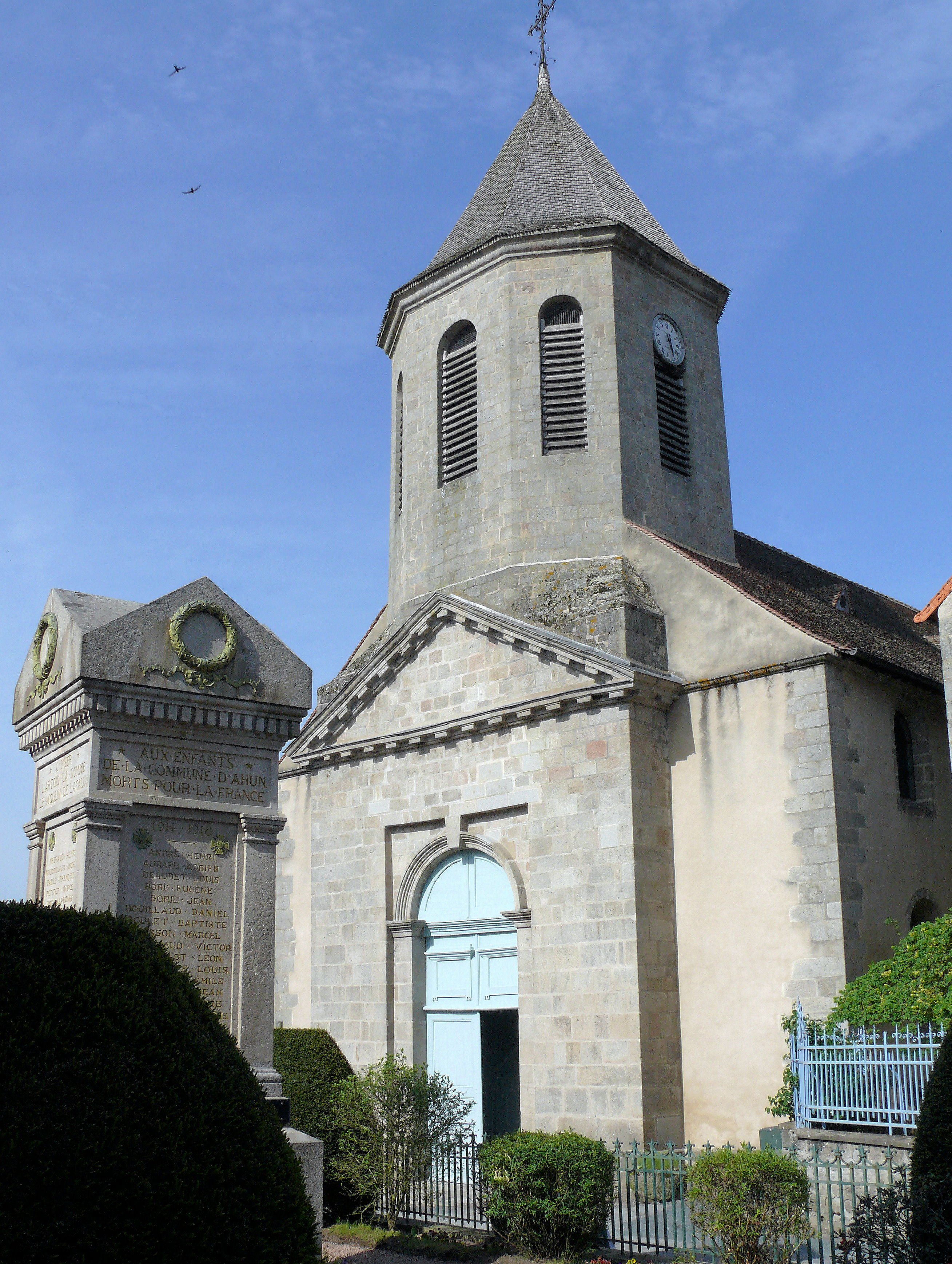 Ahun - Église Saint-Sylvain - Façade occidentale et monument aux Morts